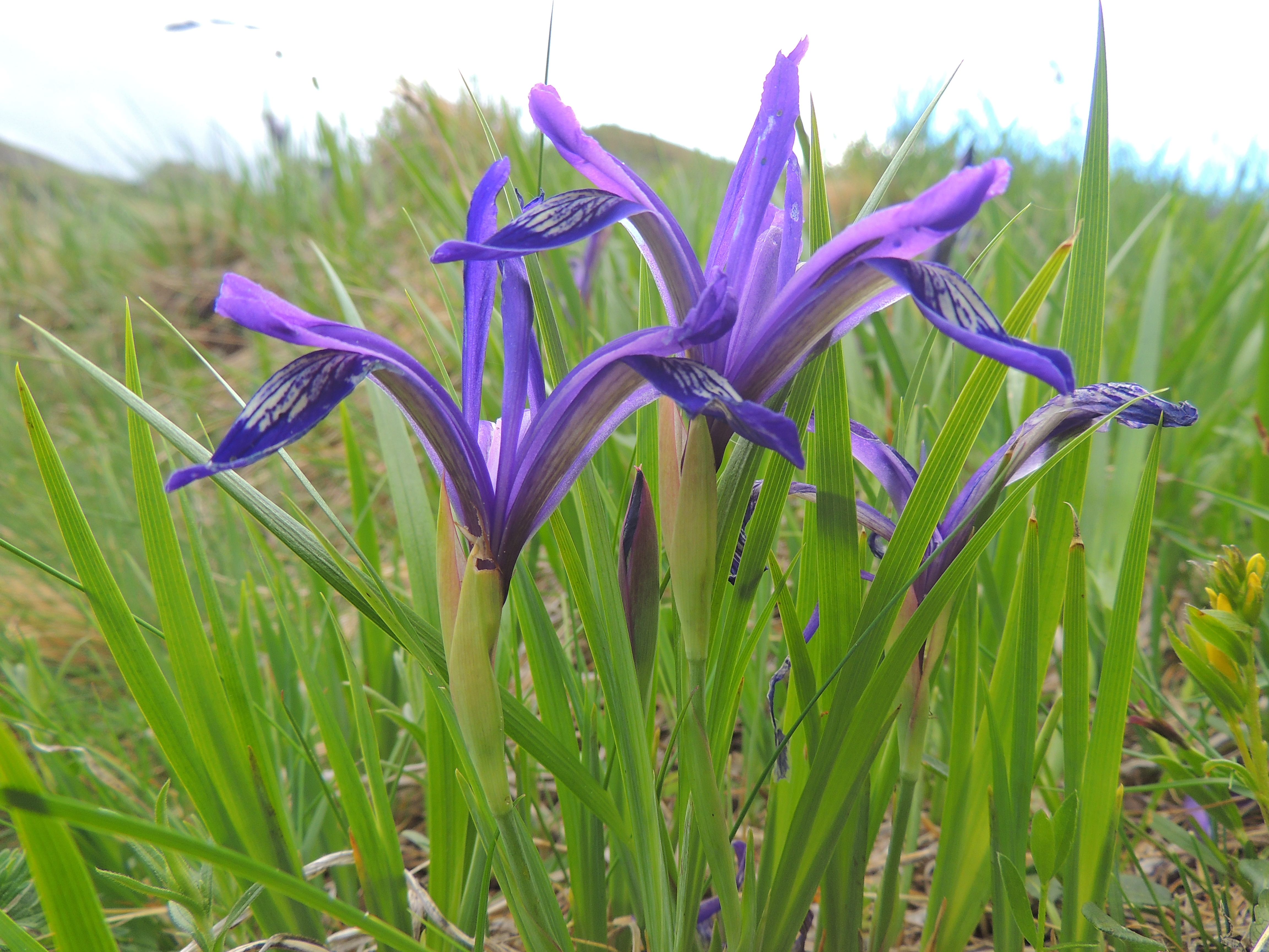 russian iris/hungarian iris Siebenbürger Gras-Schwertlilie stânjenel mic de munte